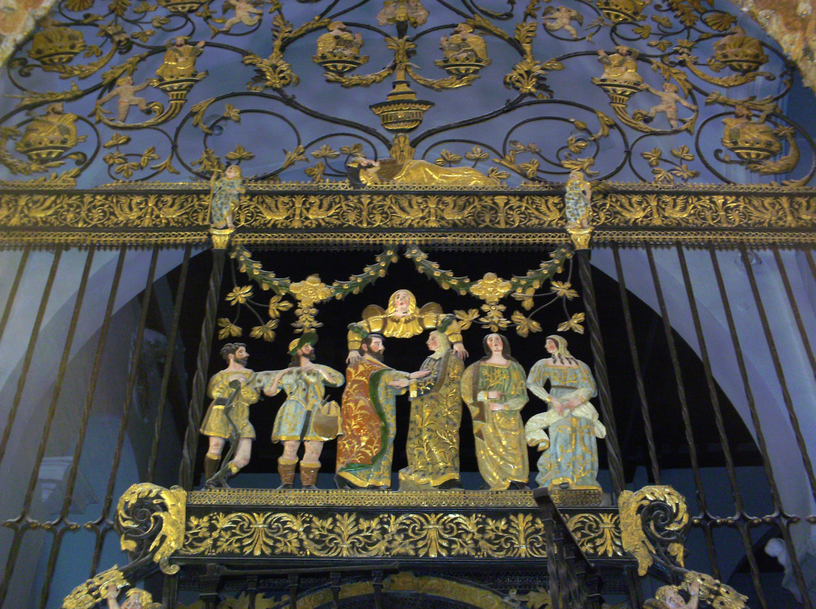 Reja del Abrazo ante la Puerta Dorada, del Maestro Bartolomé, en Jaén.